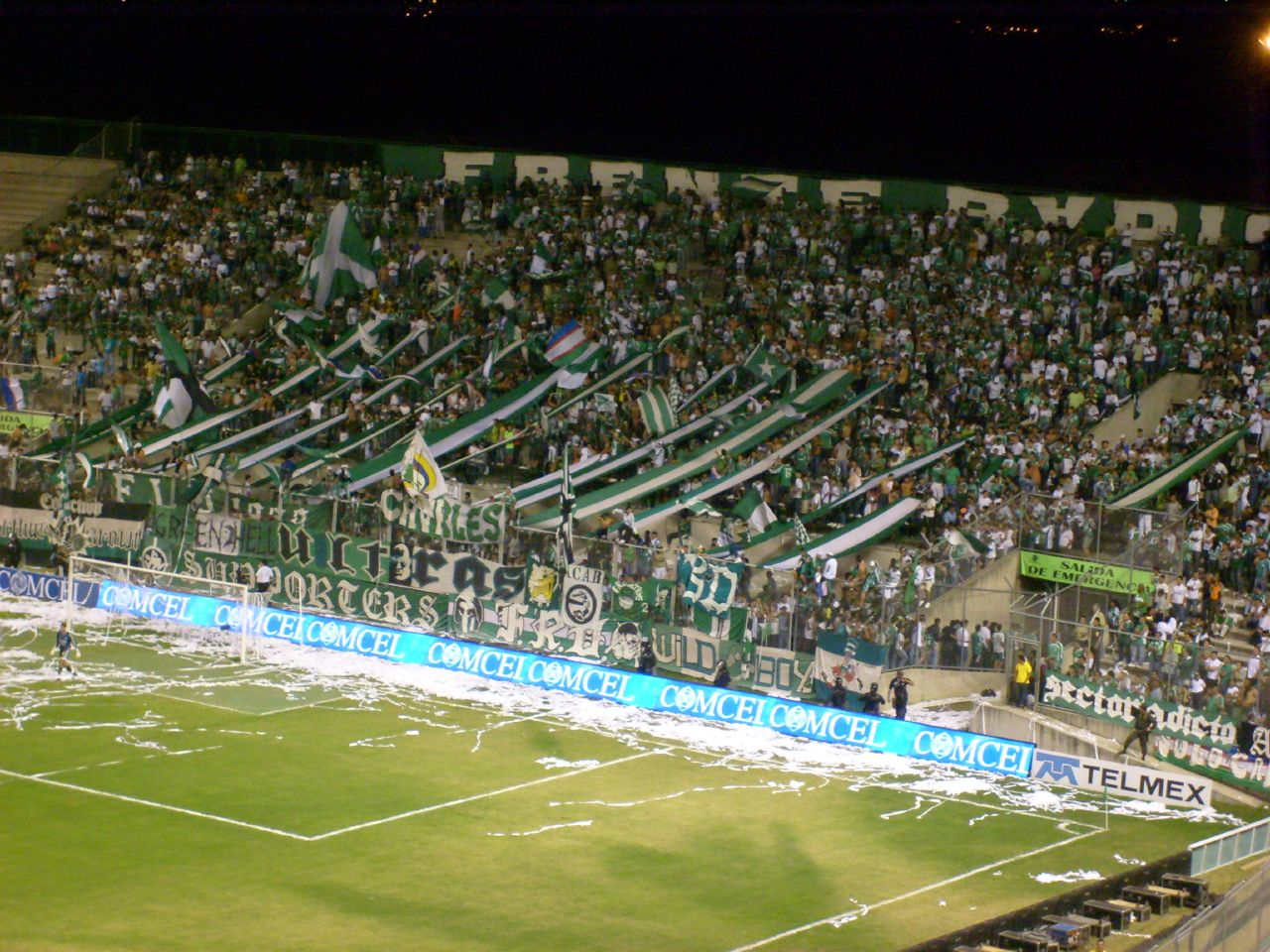 Estos manes si llenaron la tribuna